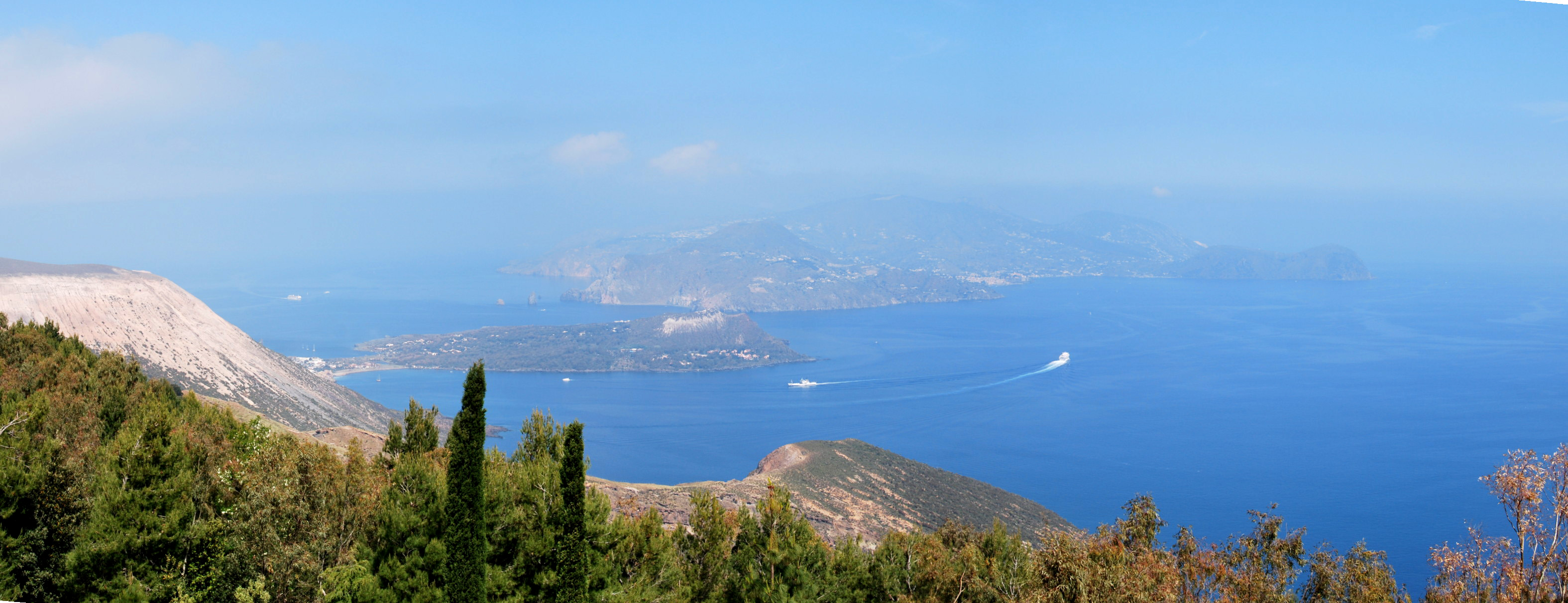 Vulcano -Landscape from capo grillo